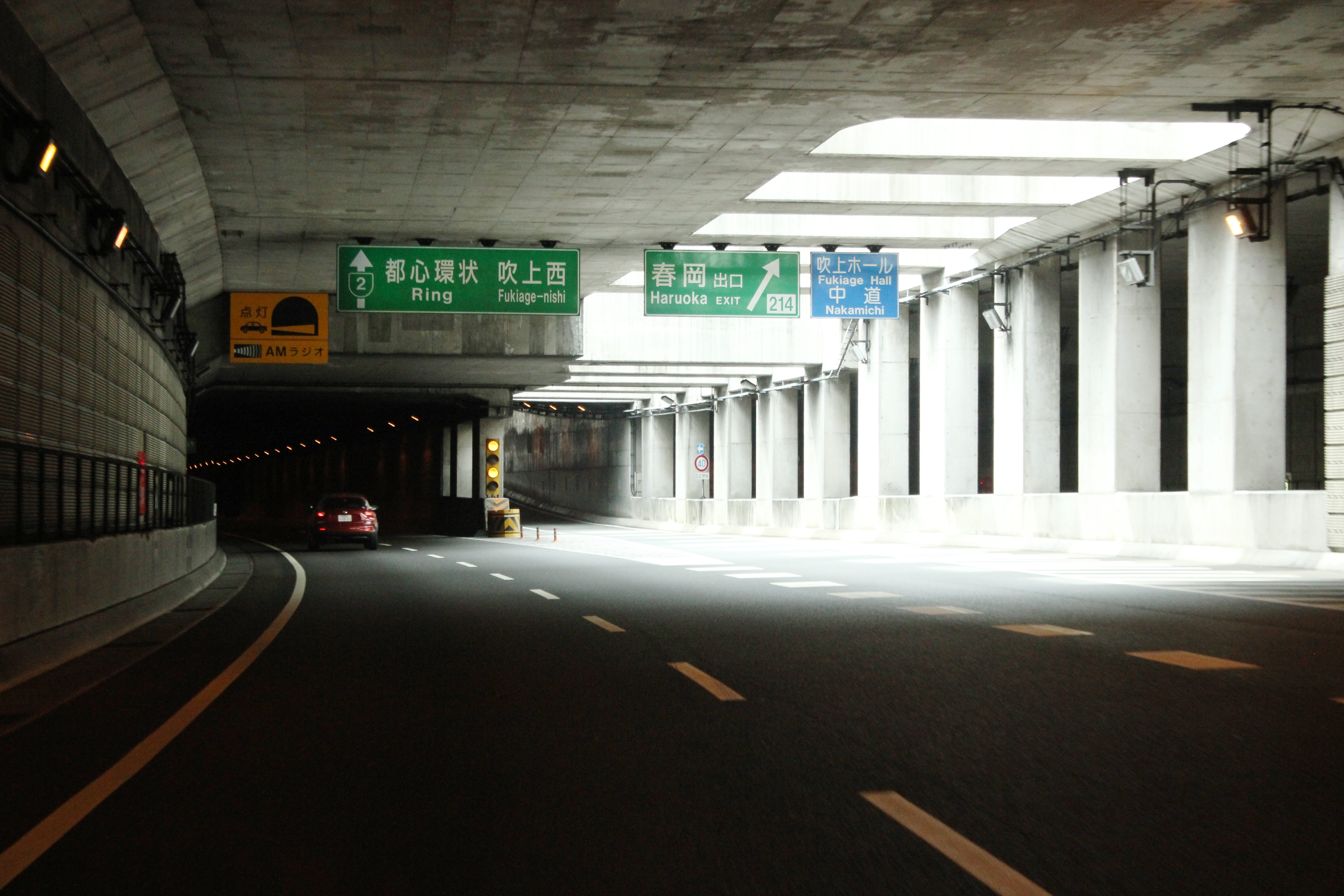 名高速東山線春岡出口